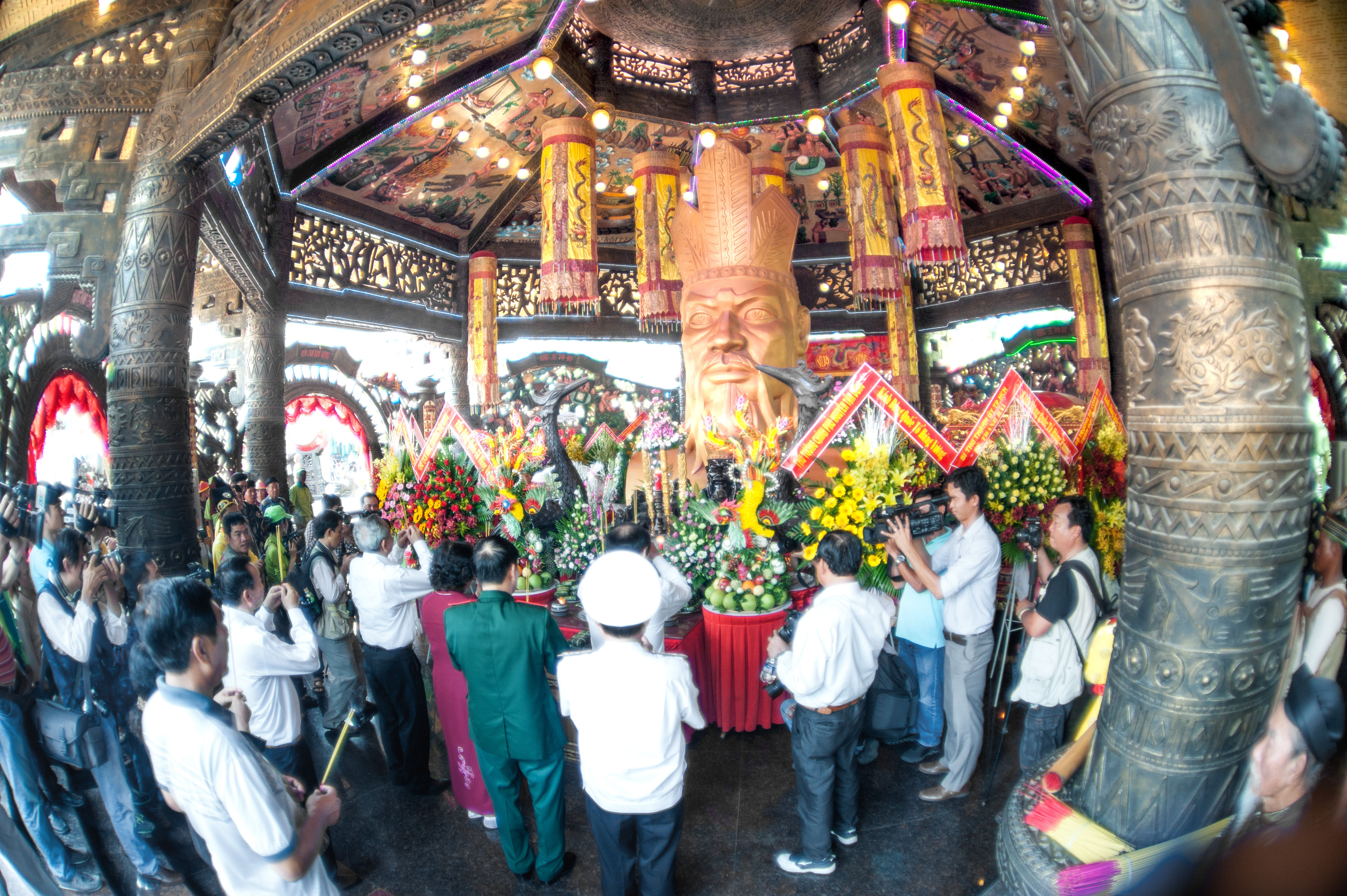 Với chủ đề “Trở về cội nguồn văn hóa dân tộc”, DLVH Suối Tiên đã xây dựng đền thờ Quốc Tổ Hùng Vương để thể hiện lòng biết ơn sâu sắc các vua Hùng có công lập quốc. Với truyền thống “Uống nước nhớ nguồn”, hàng năm DLVH Suối Tiên tổ chức “Lễ Giỗ Quốc Tổ Hùng Vương” với các nghi thức trang nghiêm, trọng thể. Đây là dịp để bà con nhân dân thành phố, du khách thập phương đến dâng hương, tưởng nhớ và tri ân công đức của các vị vua Hùng.